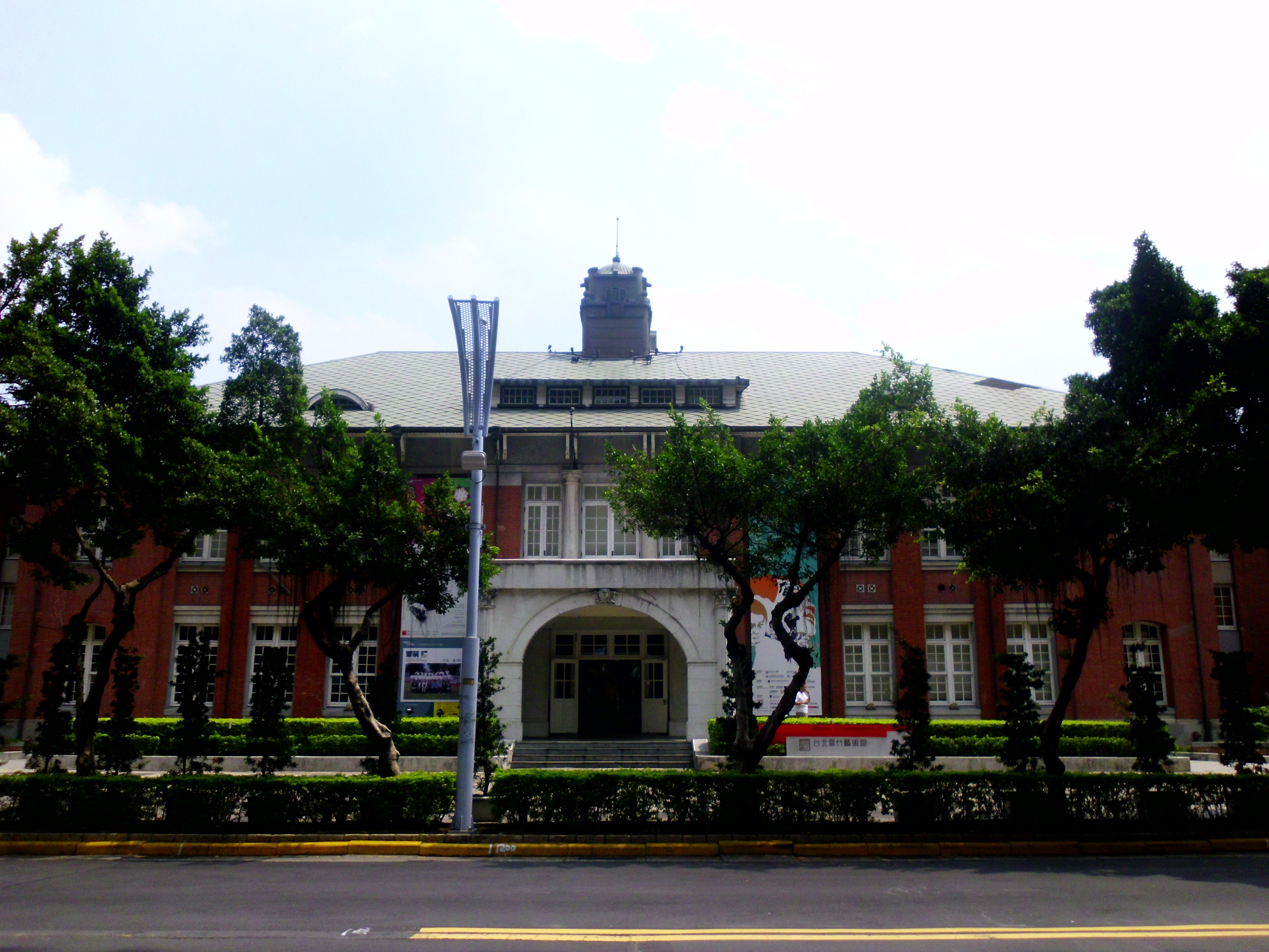 台北當代藝術館